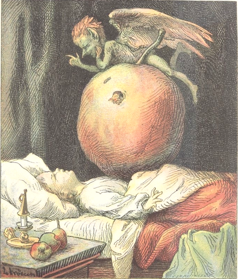 Le pommier de Robert, 1878, dessins par Lorenz Froelich (1820-1908), textes par Stahl ; Hetzel, Pierre-Jules (1814-1886) - Bibliothèque du Magasin d'éducation et de récréation ; domaine public, numérisé par Gallica 30-07-2012. Page 3.